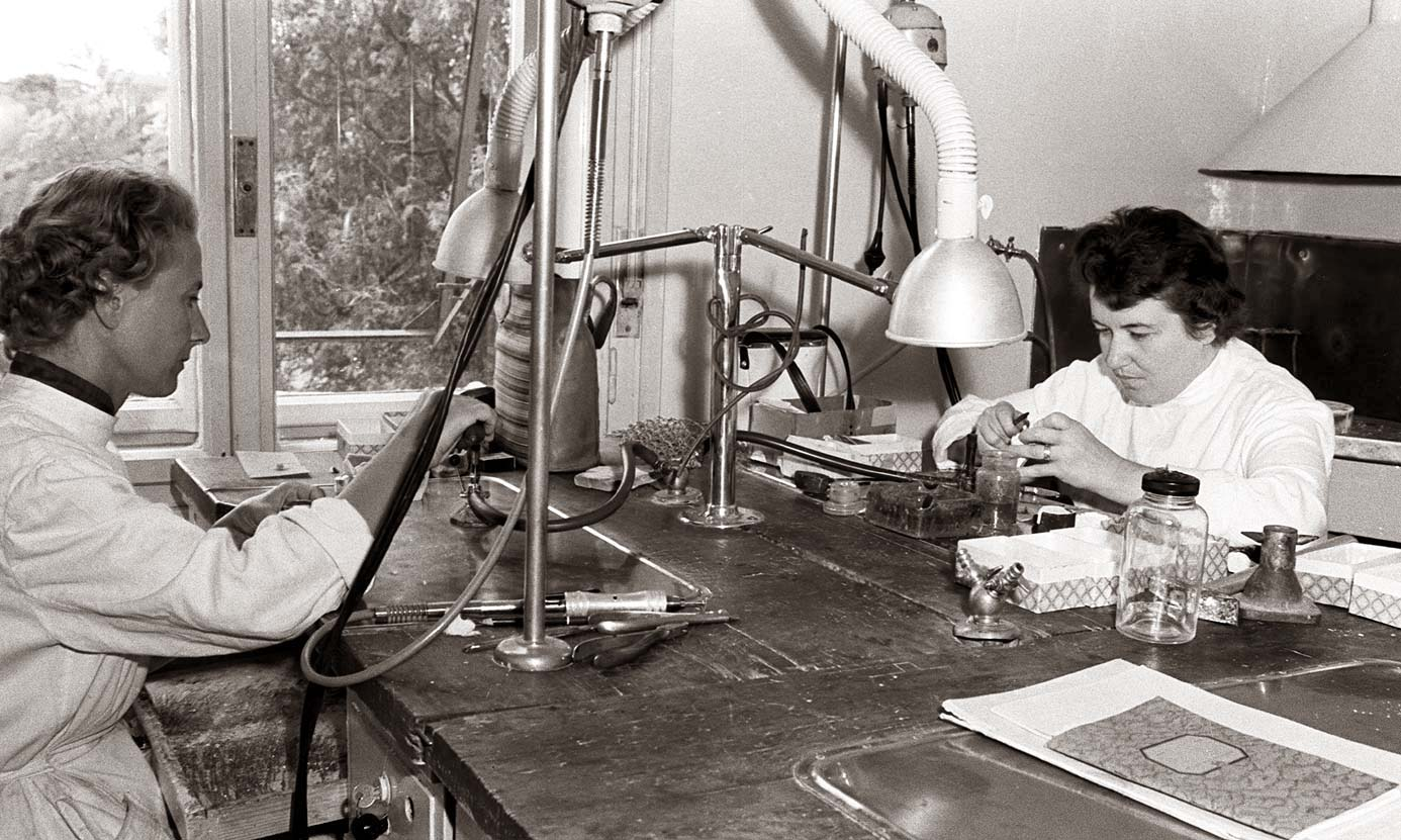 Zobna klinika v Kopališki ulici.